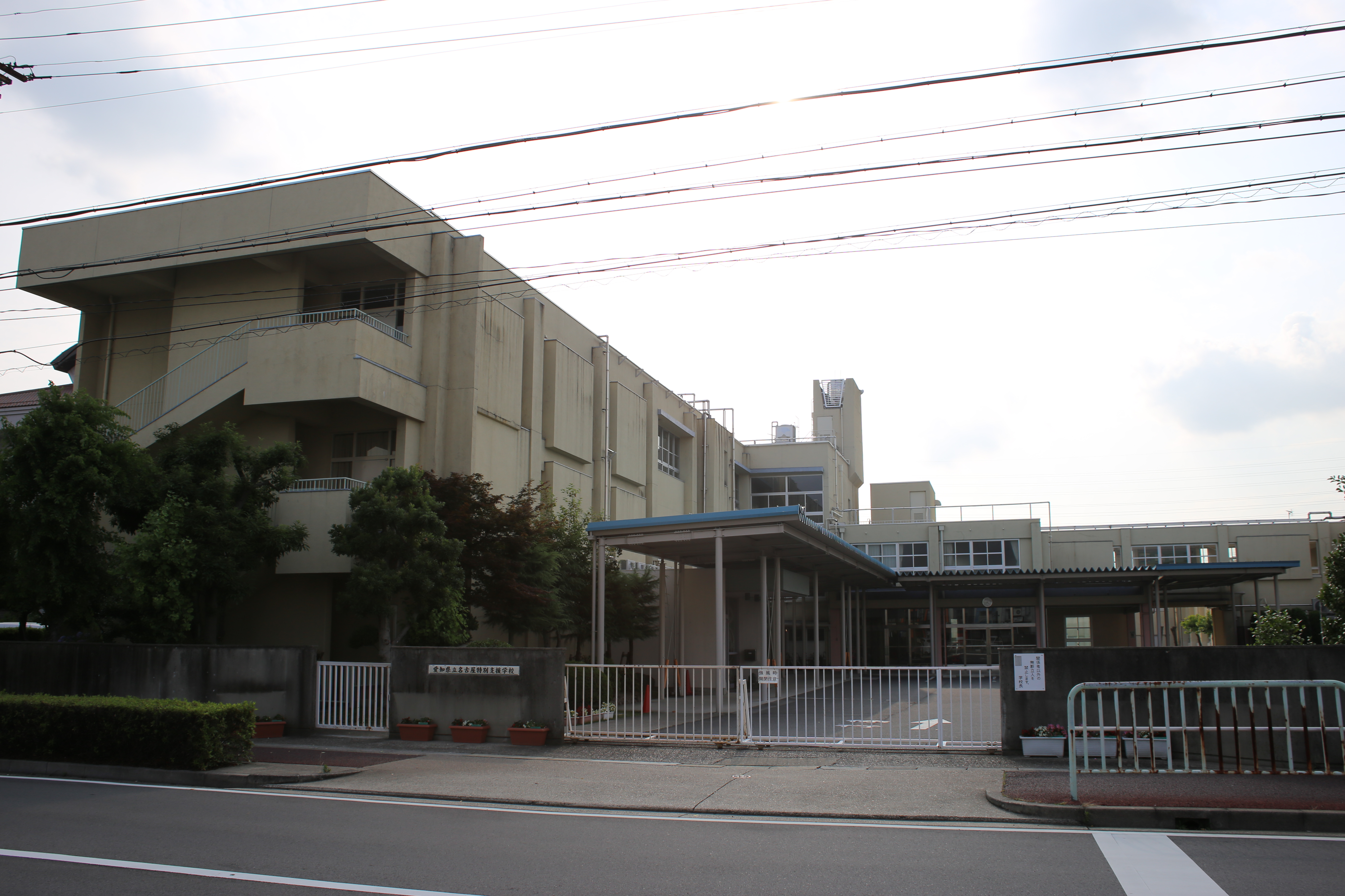 名古屋市西区中小田井五丁目の愛知県立名古屋特別支援学校を東側公道北側より撮影